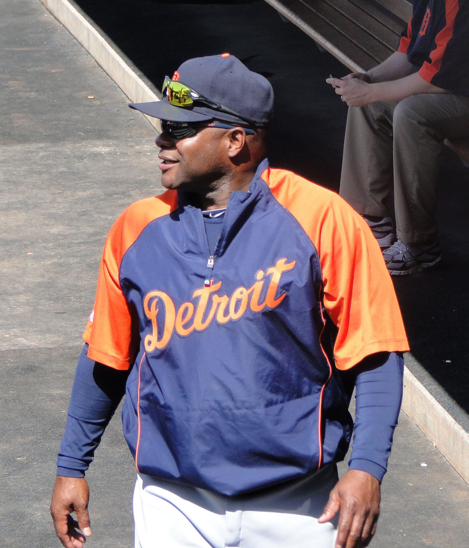 Lloyd McClendon at Dodger Stadium 07:26, 23 May 2010 . . Cbl62 . . 1,917×2,243 (1.46 MB)